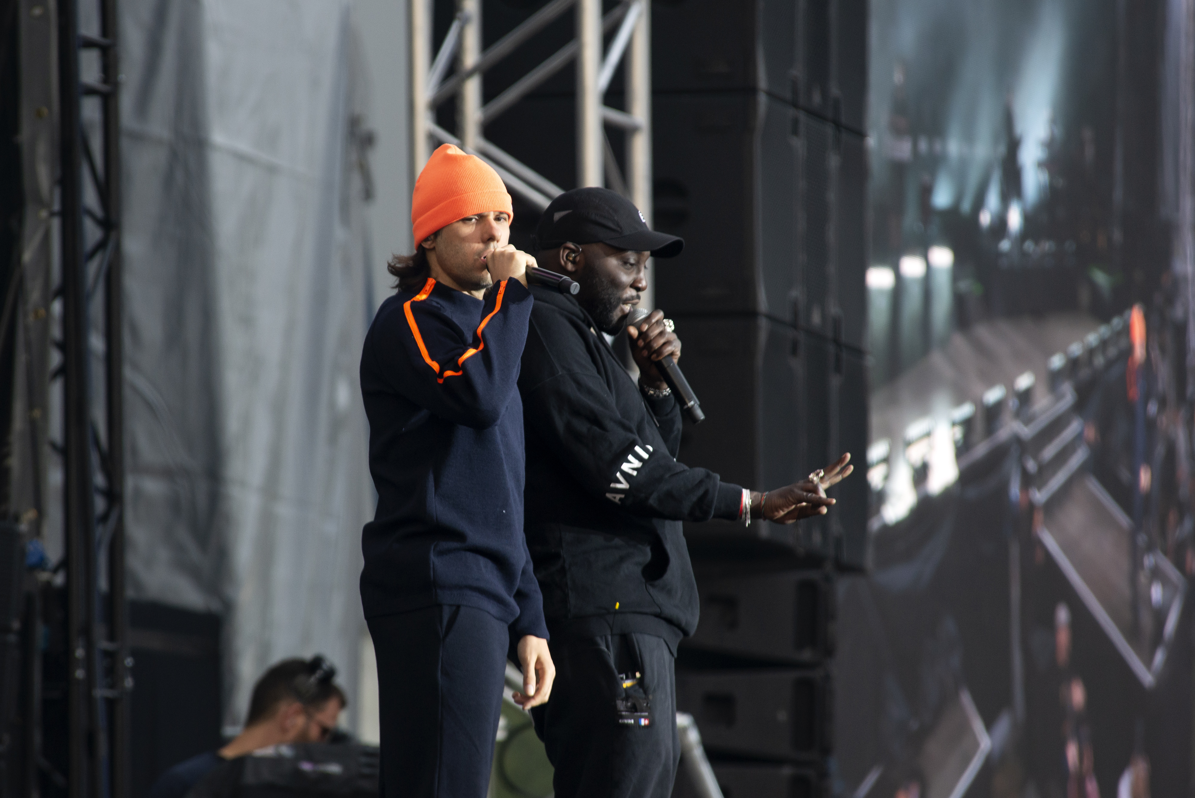 Concert d'Orelsan au festival Papillons de nuit 2019 à Saint-Laurent de Cuves, Manche, Normandie.